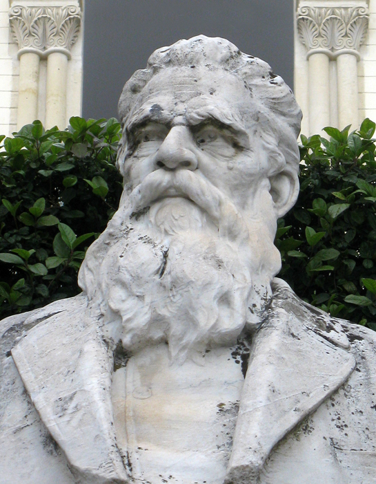 Giuseppe Sciuti, busto alla memoria in Piazza Umberto, nella natìa Zafferana Etnea (CT) - Foto D. Pennisi.